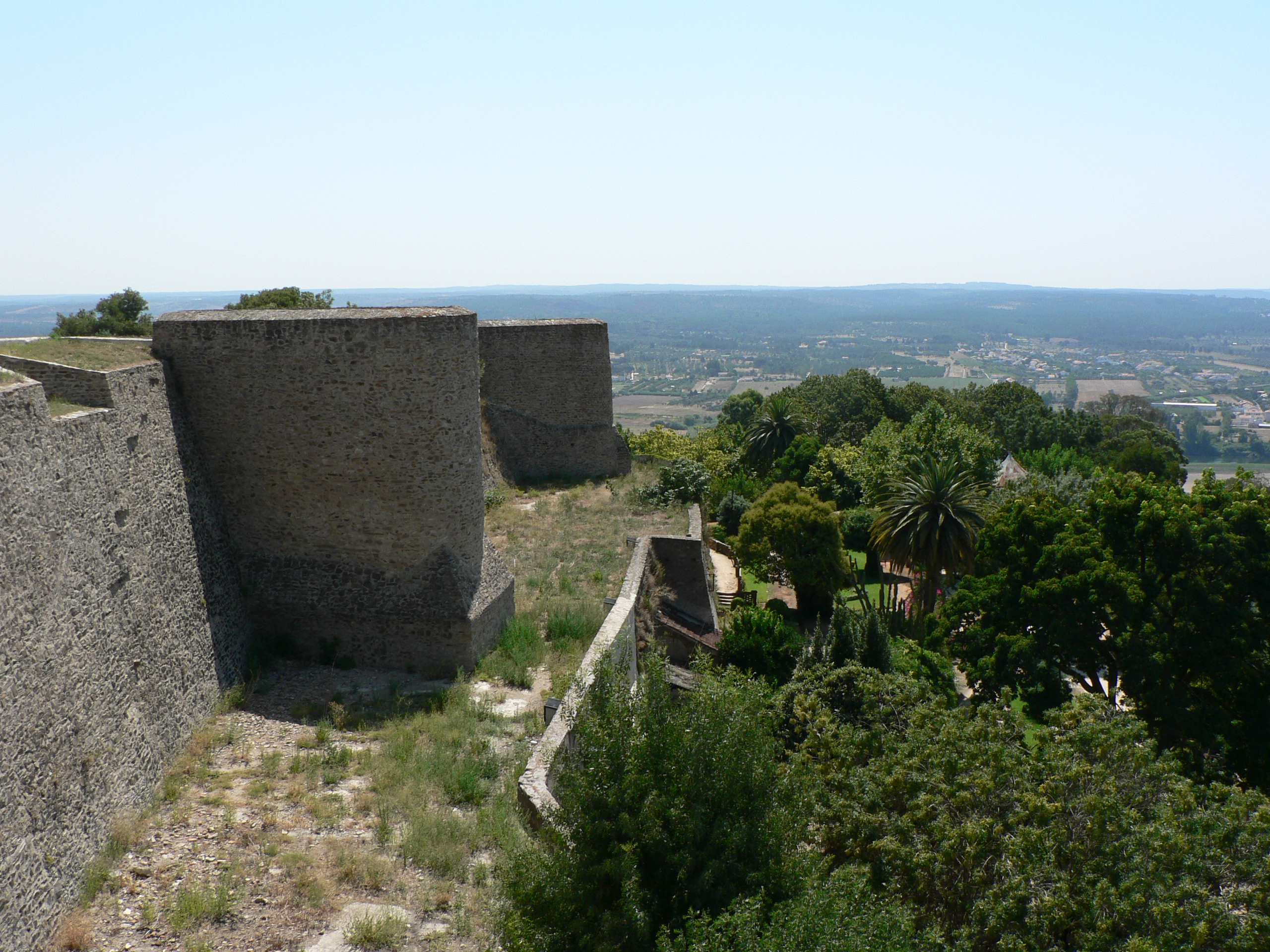 Le château d'Abrantes, Portugal